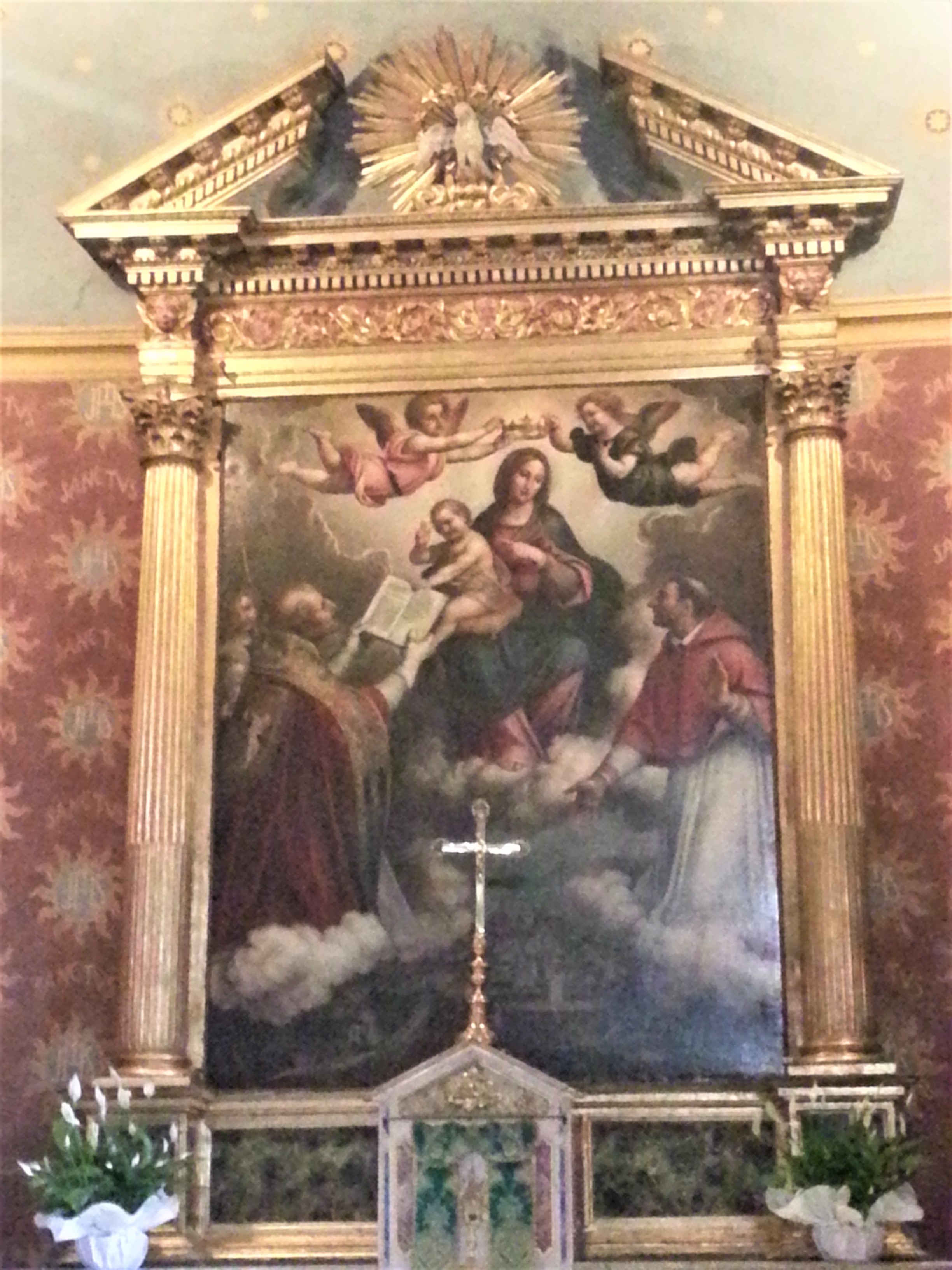 Pala di Elea Salmeggia nella chiesa di san Gregorio a Gromo